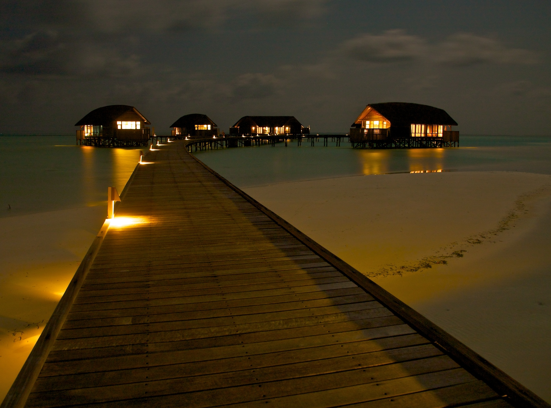 Essential Maldives (COCOA ISLAND/MALDIVES)